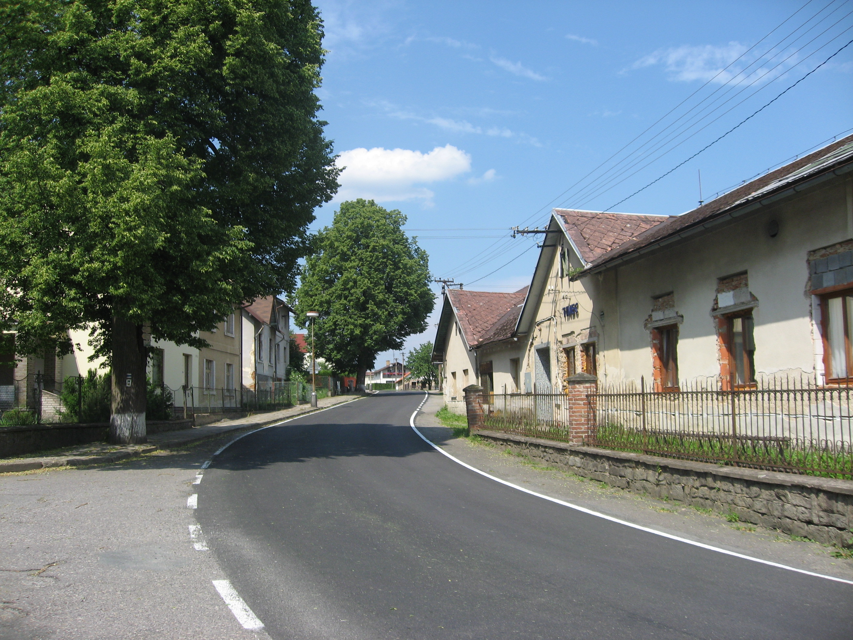 Mladé Bříště